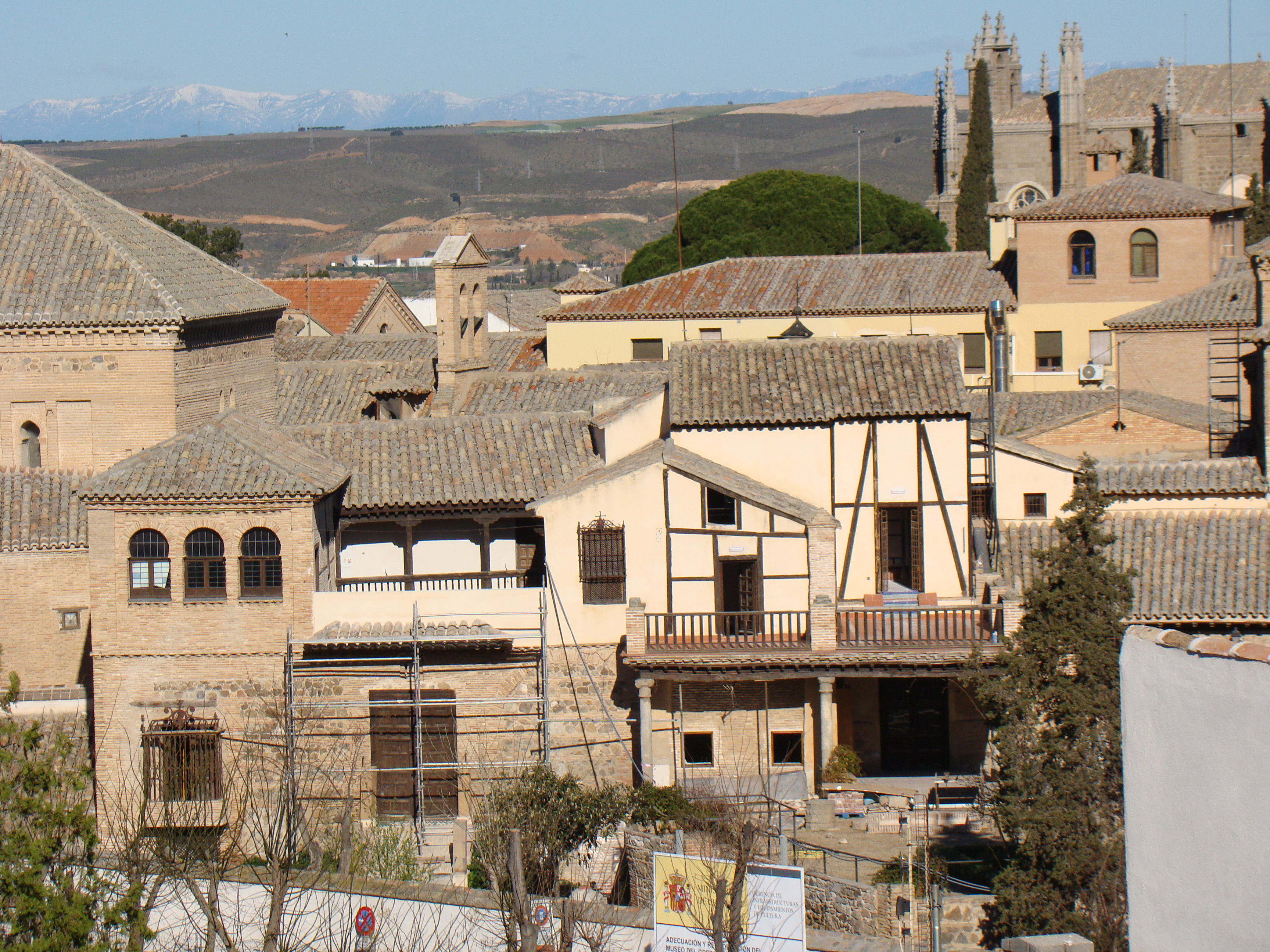 Casa y Museo del Greco